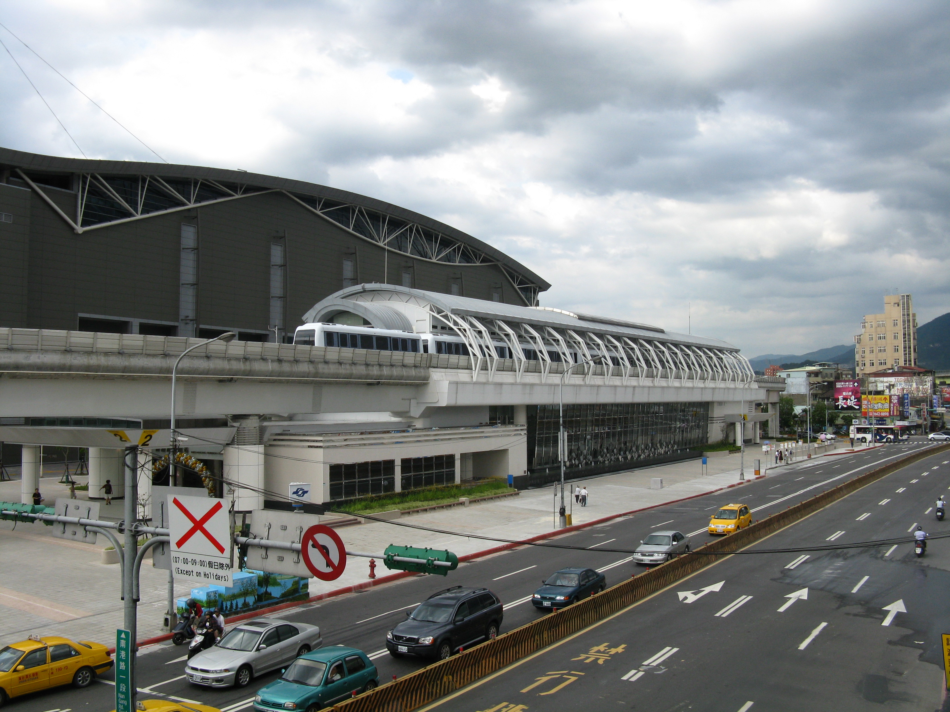 台北捷運内湖線開業日の南港展覧館駅。 中文（台灣）: 台北捷運內湖線通車日的南港展覽館站。